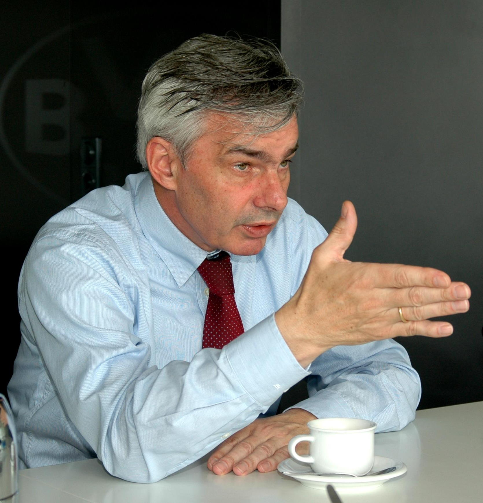 M. Meier im Rahmen eines Gesprächs mit der Redaktion "Die Kirsche"